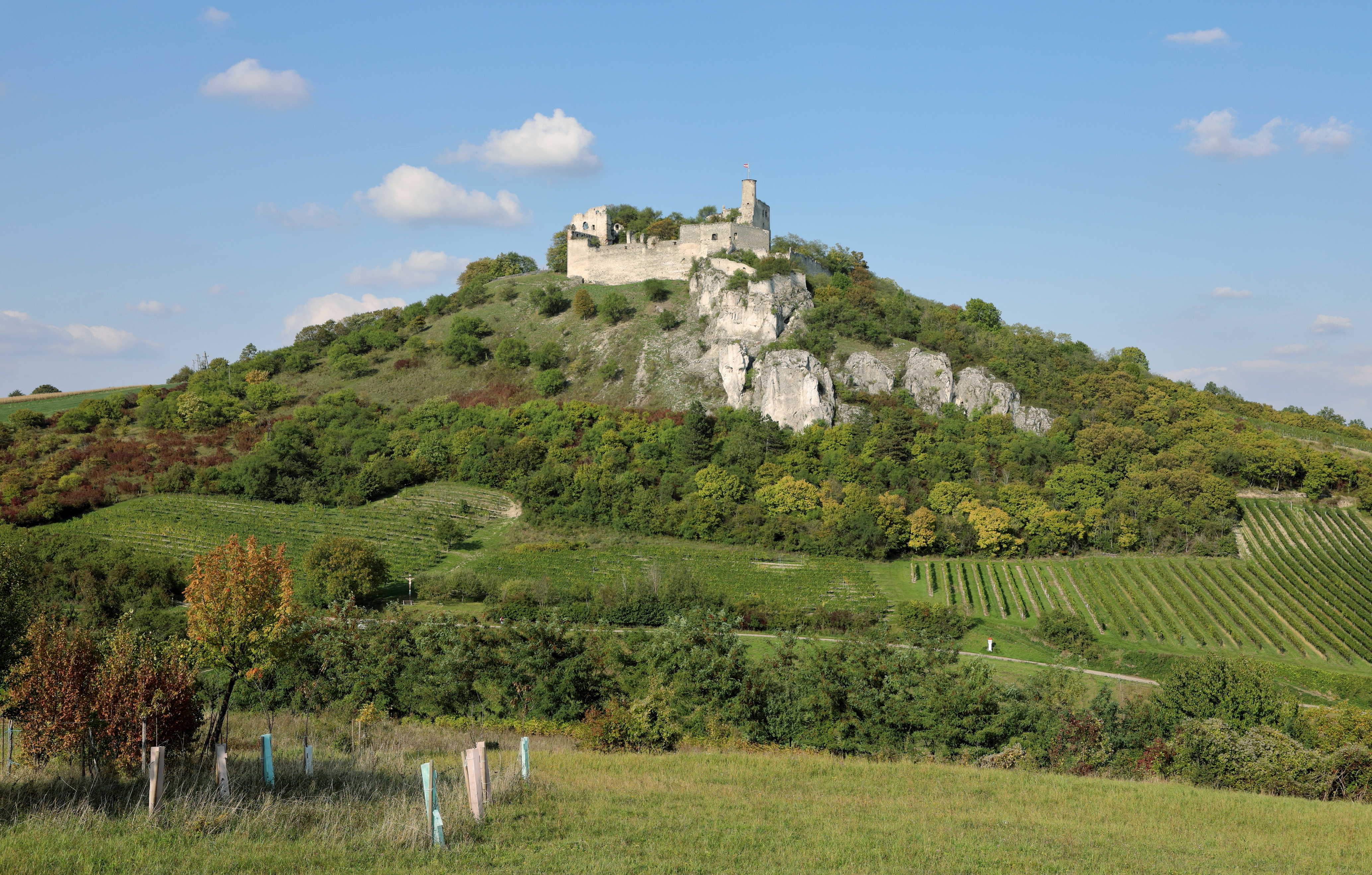 Südansicht der Burg Falkenstein in der niederösterreichischen Marktgemeinde Falkenstein.Die Burg wurde auf einer Kalkklippe nordwestlich des Ortes vermutlich um 1050 errichtet und in mehreren Bauphasen erweitert. Ab Ende des 16. Jahrhundert wurde sie zu einem „Bergschloss“ umgebaut. 1645 erfolgte die Eroberung durch die Schweden im Zuge des Dreißigjährigen Krieges. Später wurde die Burg bis zur Abmauerung des Burgtores um 1820 als „Steinbruch“ für billiges Baumaterial genutzt.